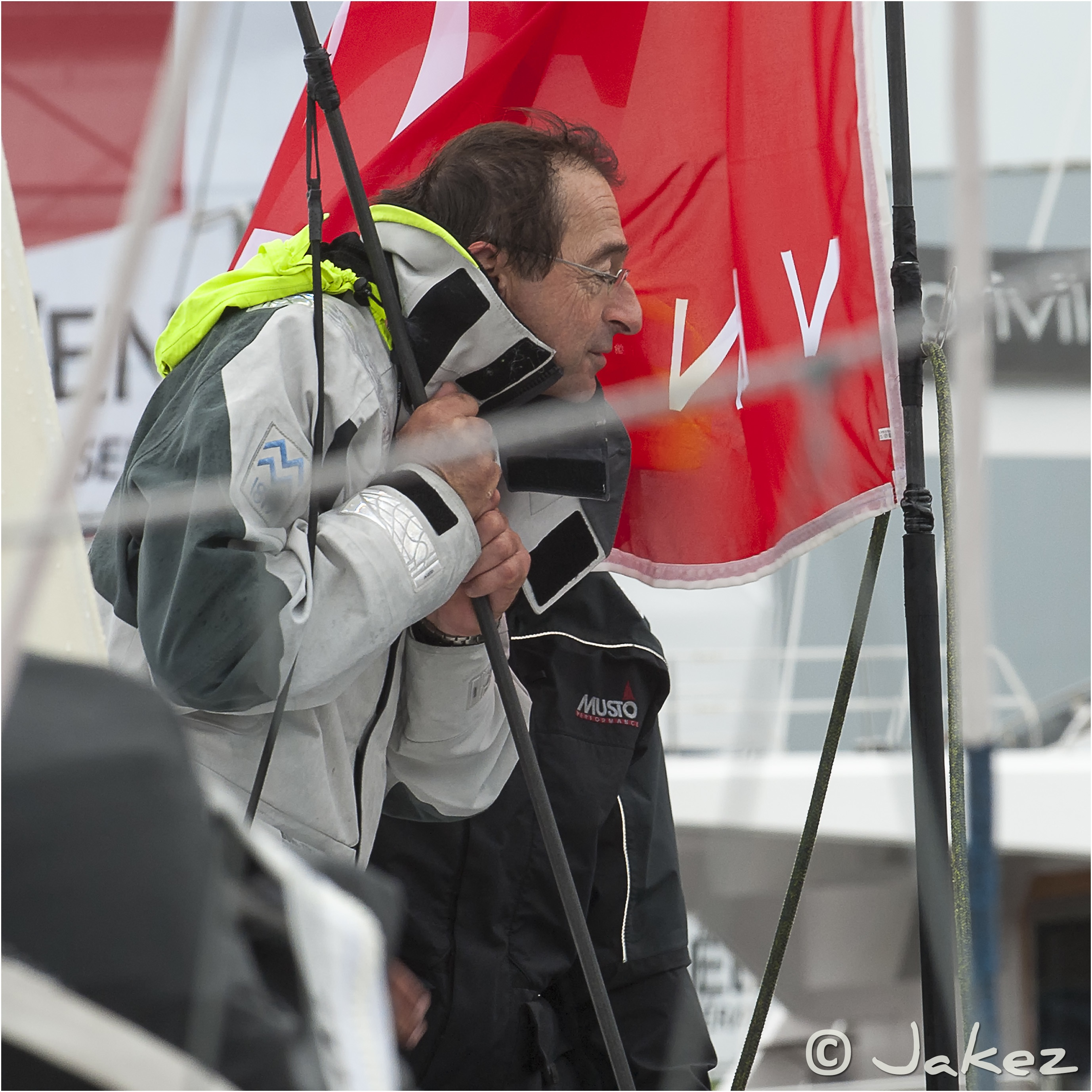 0249-Vendée 2012 (Ponton)